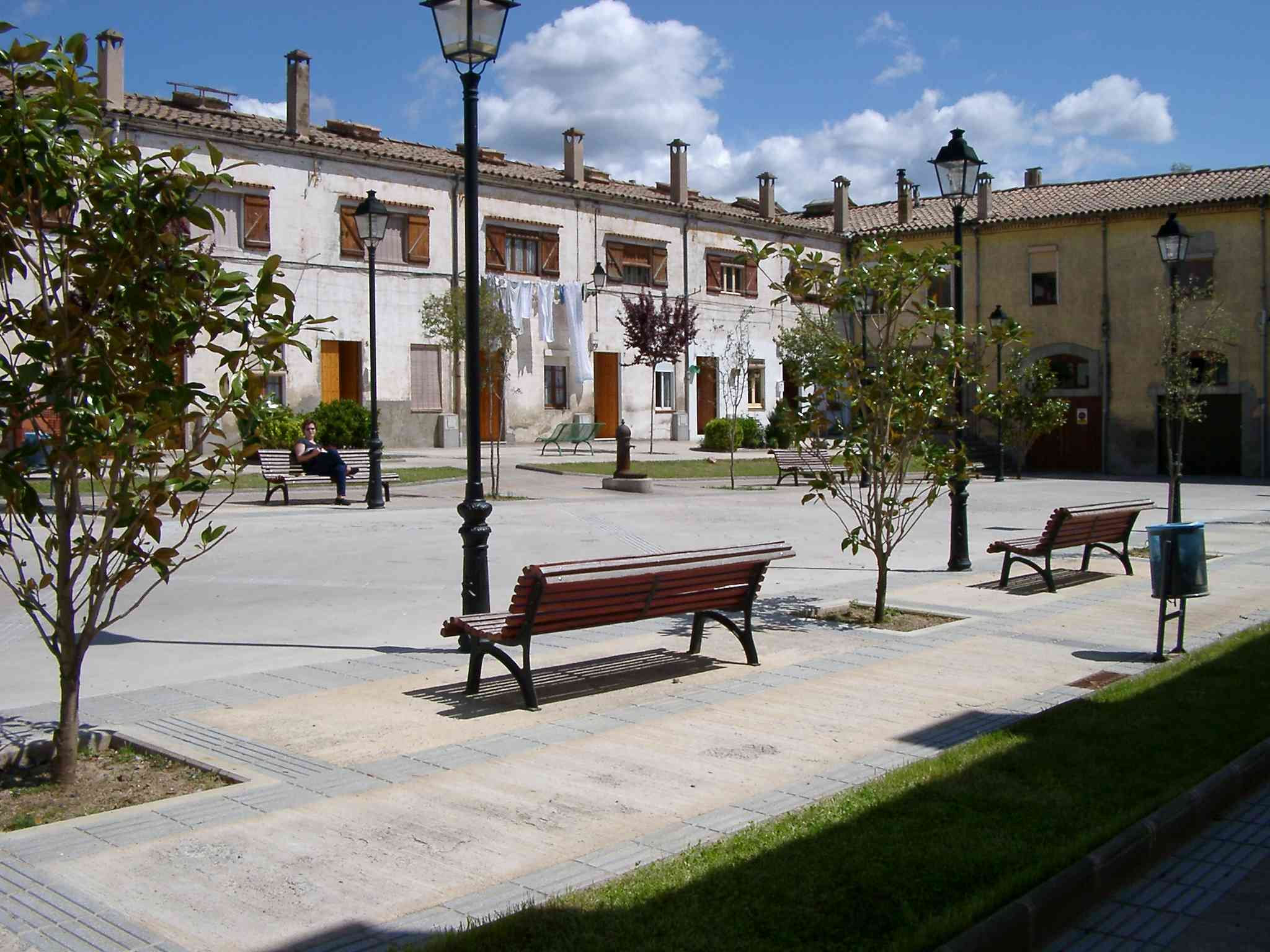 Ametlla de Merola. Foto Plaça mercat 2001